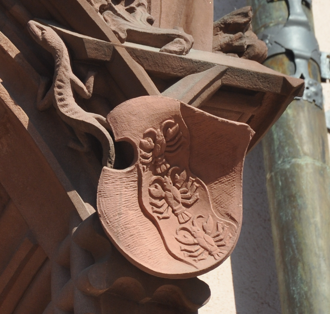 Frankfurt am Main, Rathaus (Römer), Haus zum Römer, Fassade, Wappen am Balkon, obere Reihe, Nr. 11: Familie Uffenbach